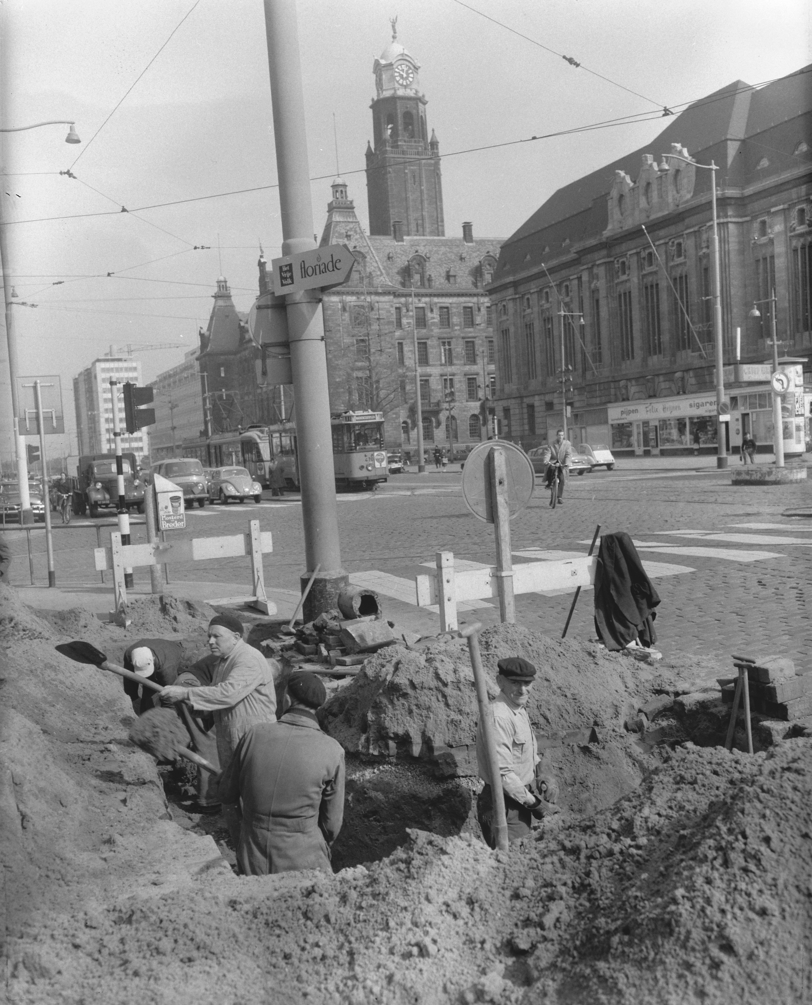 Collectie / Archief : Fotocollectie Anefo Reportage / Serie : [ onbekend ] Beschrijving : Eerste werkzaamheden voor metrobouw in Rotterdam, graafwerkzaamheden op de Coolsingel Datum : 19 april 1960 Locatie : Rotterdam, Zuid-Holland Trefwoorden : graafwerkzaamheden, metrobouw Persoonsnaam : Coolsingel Fotograaf : Behrens, Herbert / Anefo Auteursrechthebbende : Nationaal Archief Materiaalsoort : Negatief (zwart/wit) Nummer archiefinventaris : bekijk toegang 2.24.01.04 Bestanddeelnummer : 911-1770